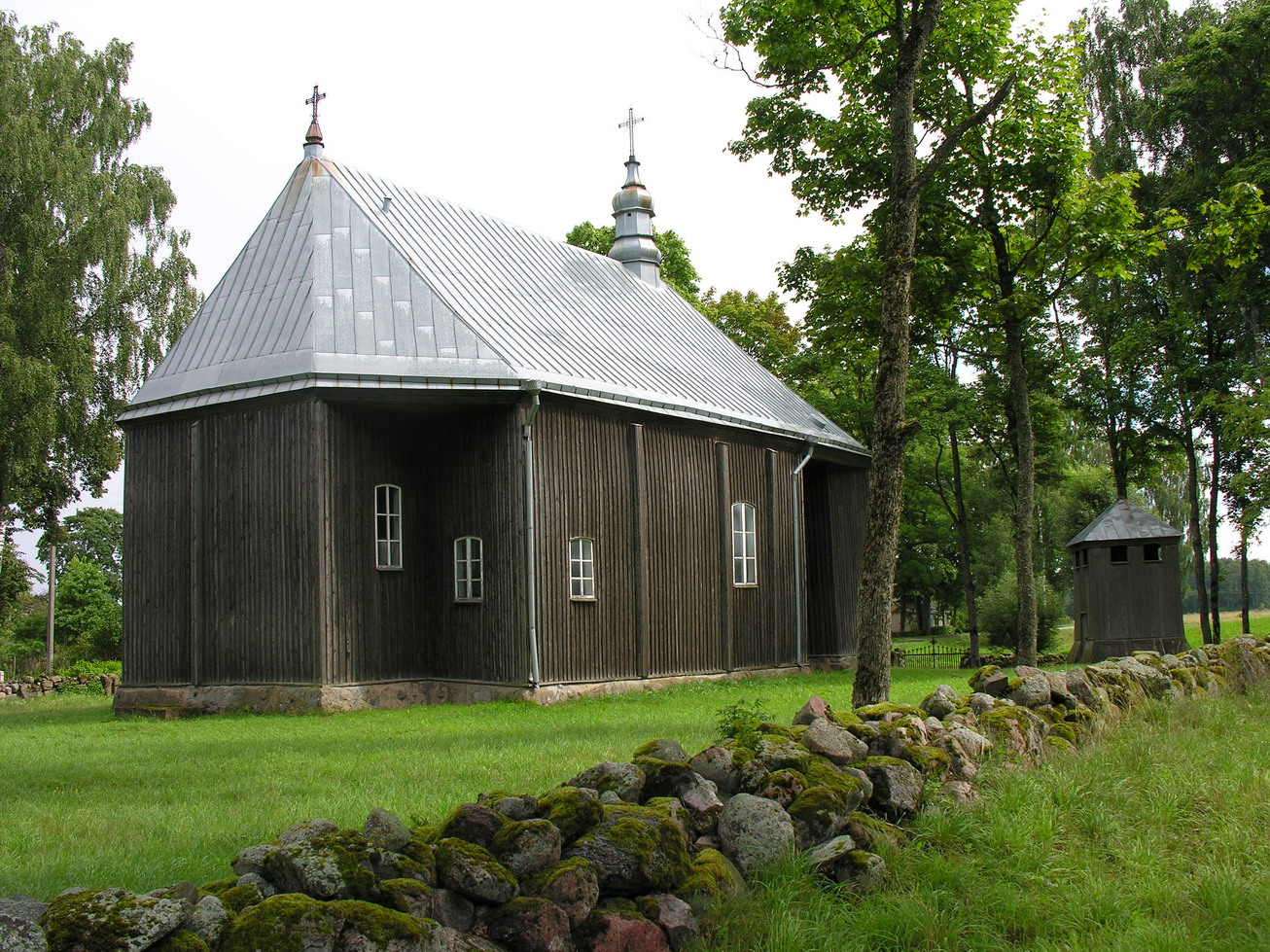 Geidžių šv. Onos bažnyčia, Mažeikių raj.